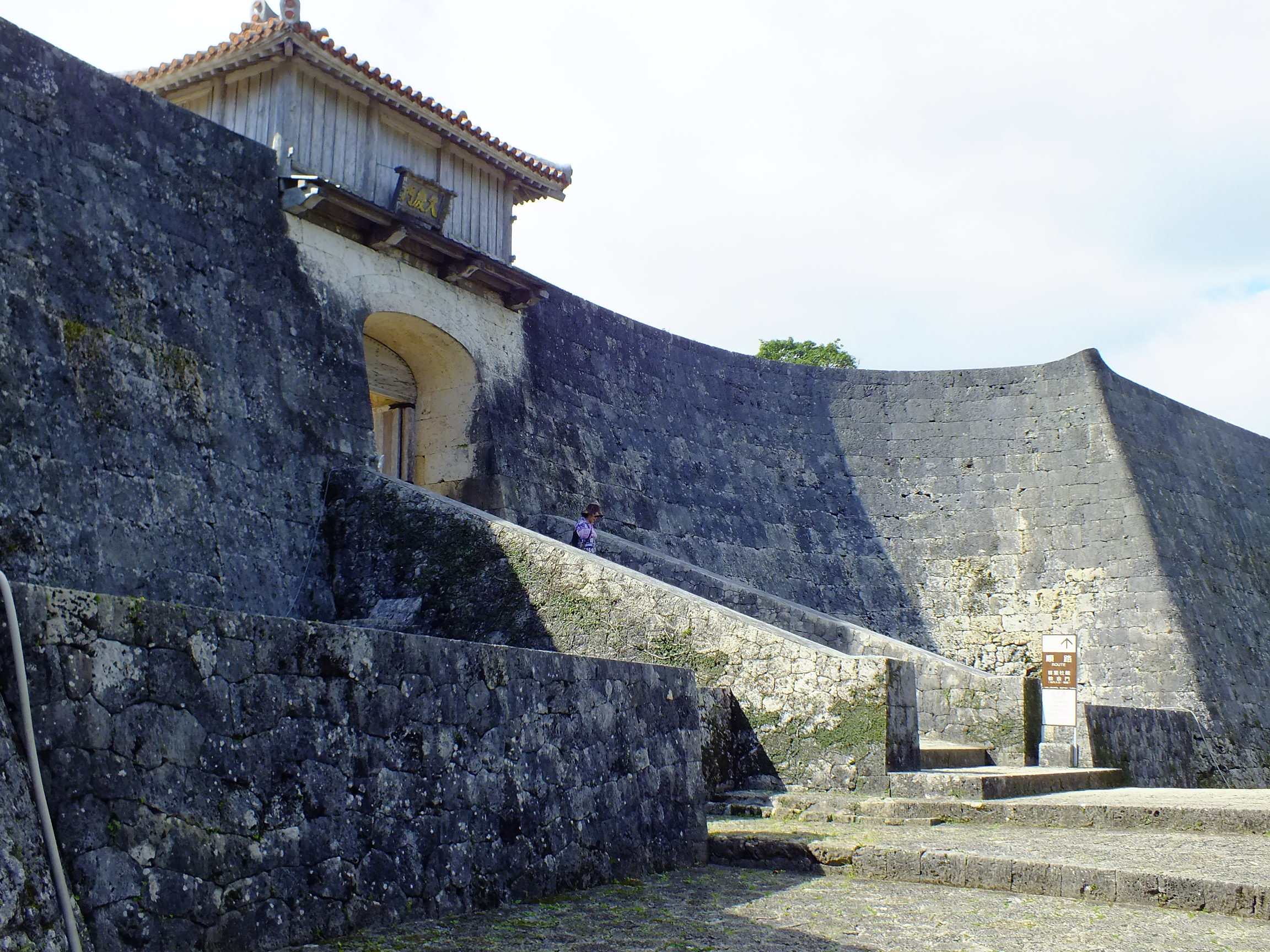 2014-02-28 Shuri Castle,Naha,Okinawa 首里城久慶門（沖縄県那覇市）